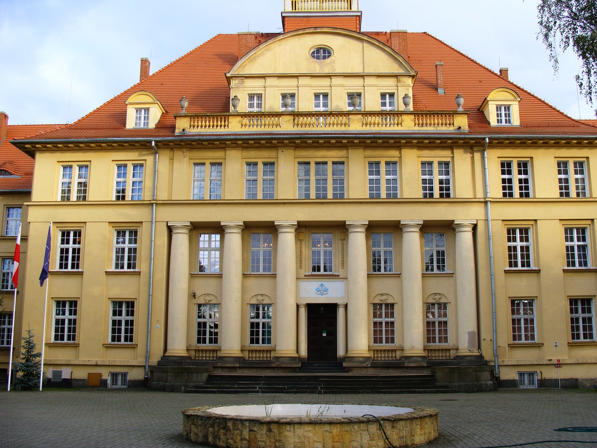 Bydgoszcz, szkoła wojenna, ob. sztab, 1913-1914